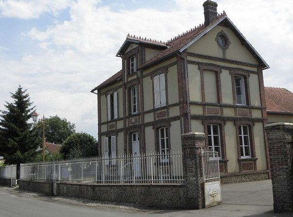 Mairie de Saint-Christophe-sur-Avre (27).